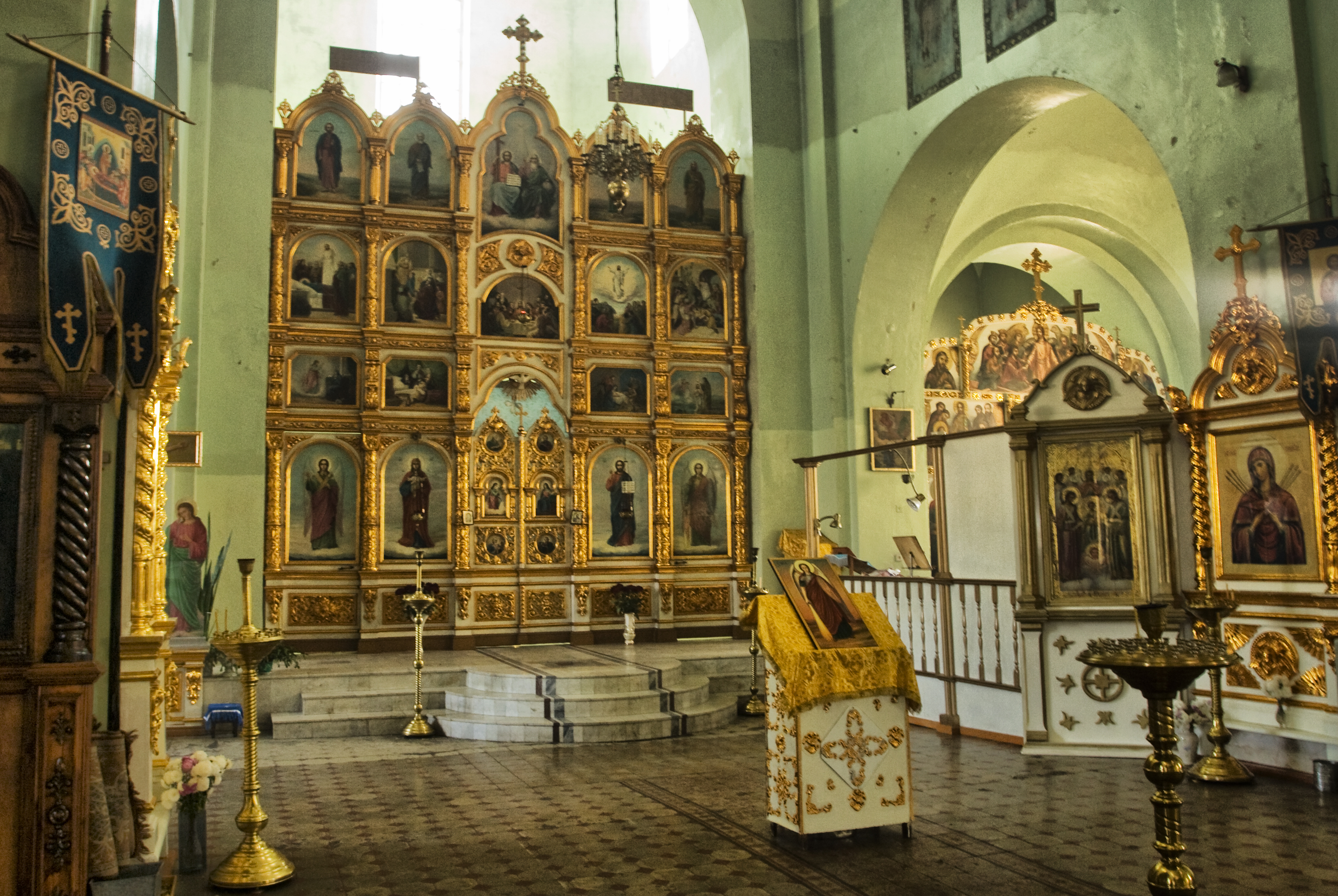 Самара, Храм во имя Архистратига Божия Михаила